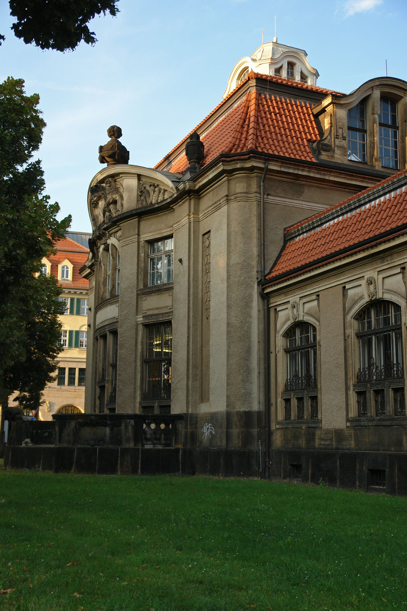 Kunstgewerbeakademie Dresden